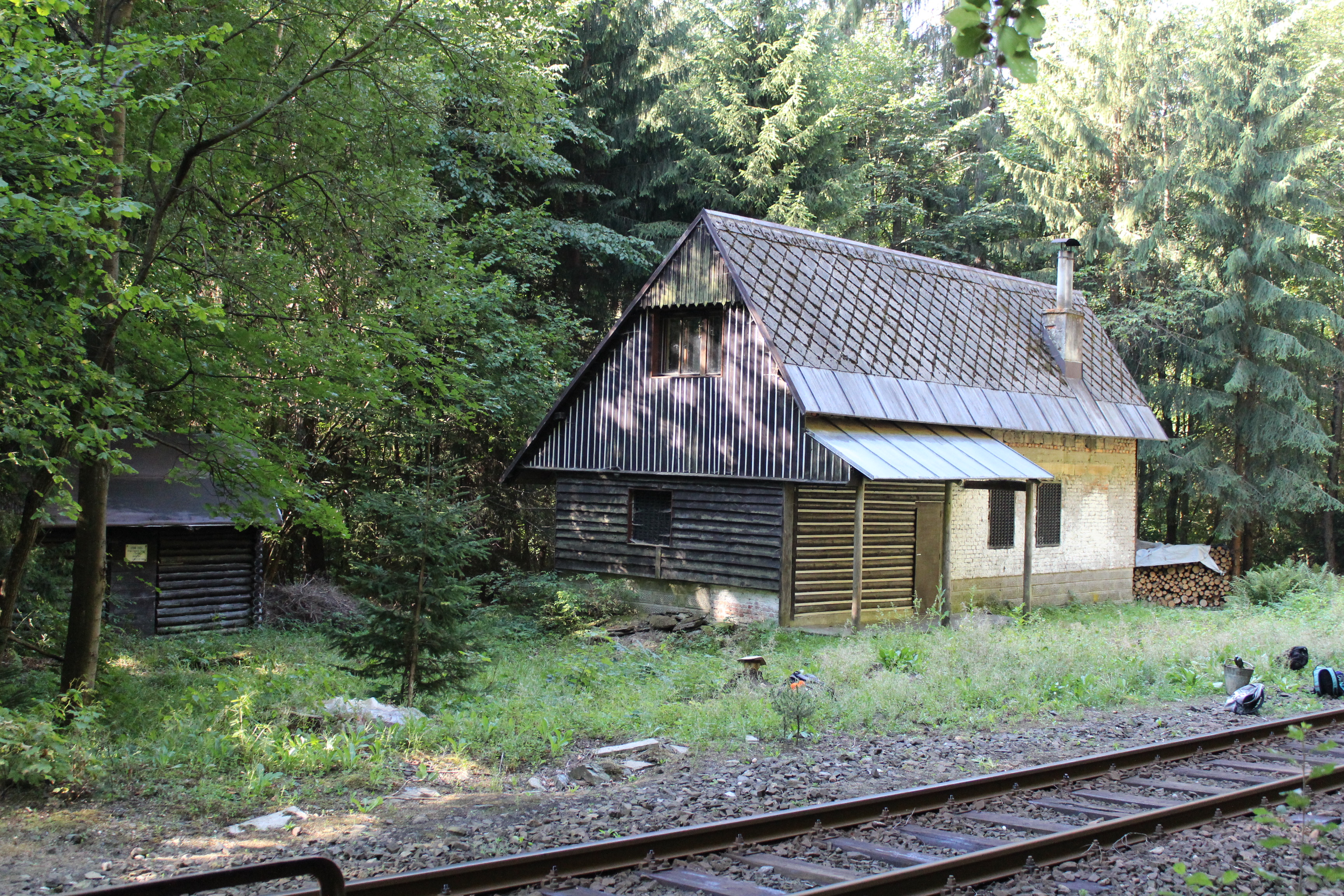 Bývalá železniční zastávka Držkov